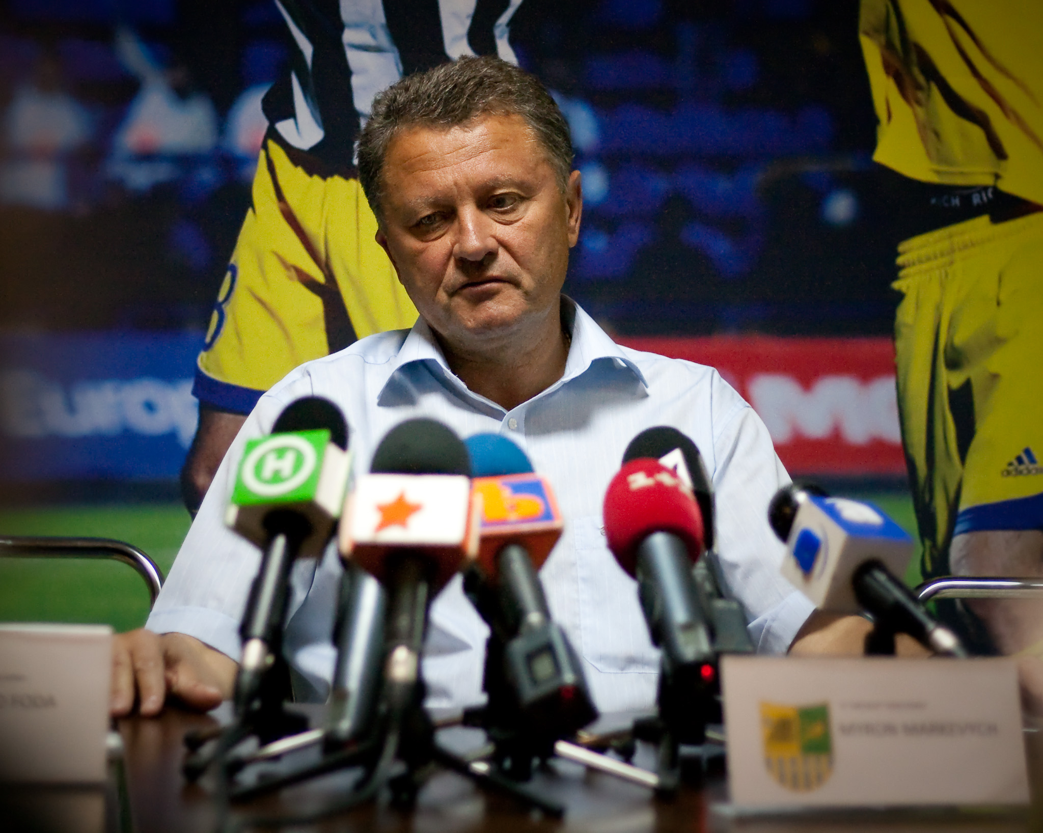 Маркевич Мирон Богданович